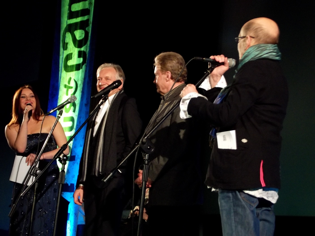 Zdjęcie zrobione podczas premiery zrekonstruowanej cyfrowo "Ziemi Obiecanej", podczas festiwalu filmowego OFF Plus Camera.